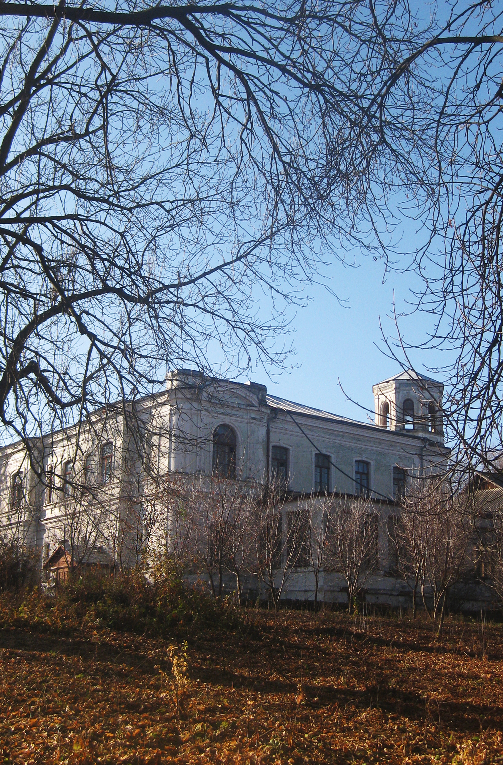 Палац Залевських (мур.), с. Дзеленці